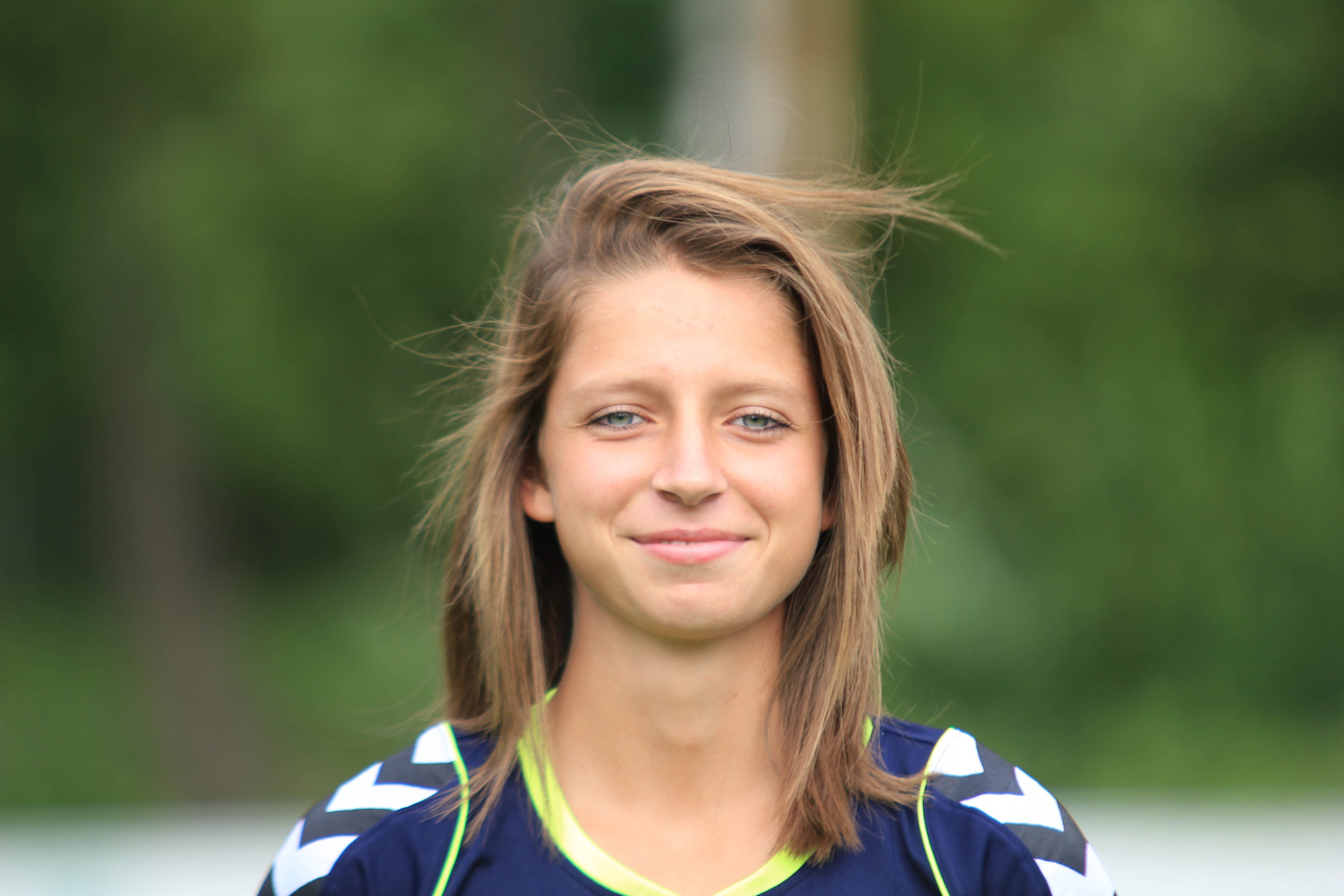 Daria Streng, FCR 2001 Duisburg